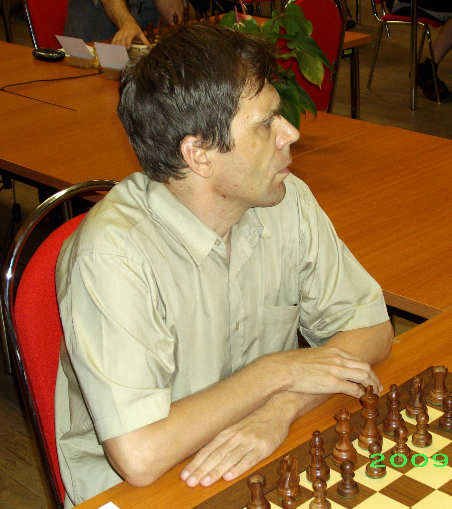 GM Viacheslav Zakhartsov, FIDE OPEN Stare Mesto 2009.